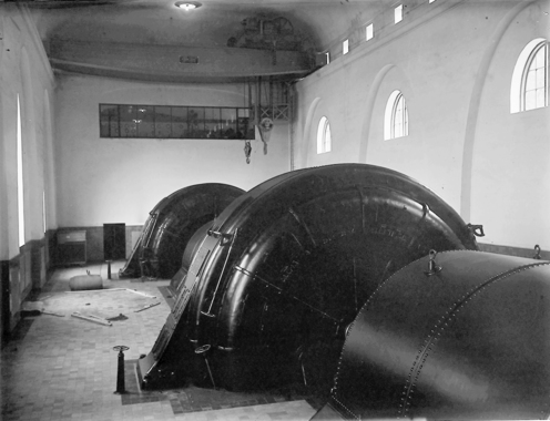 Fykan kraftstasjon i Glomfjord. Interiør i turbinhallen.